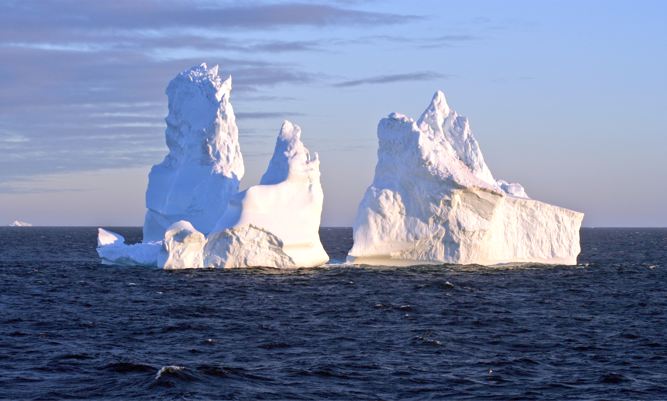 Iceberg inGreenland